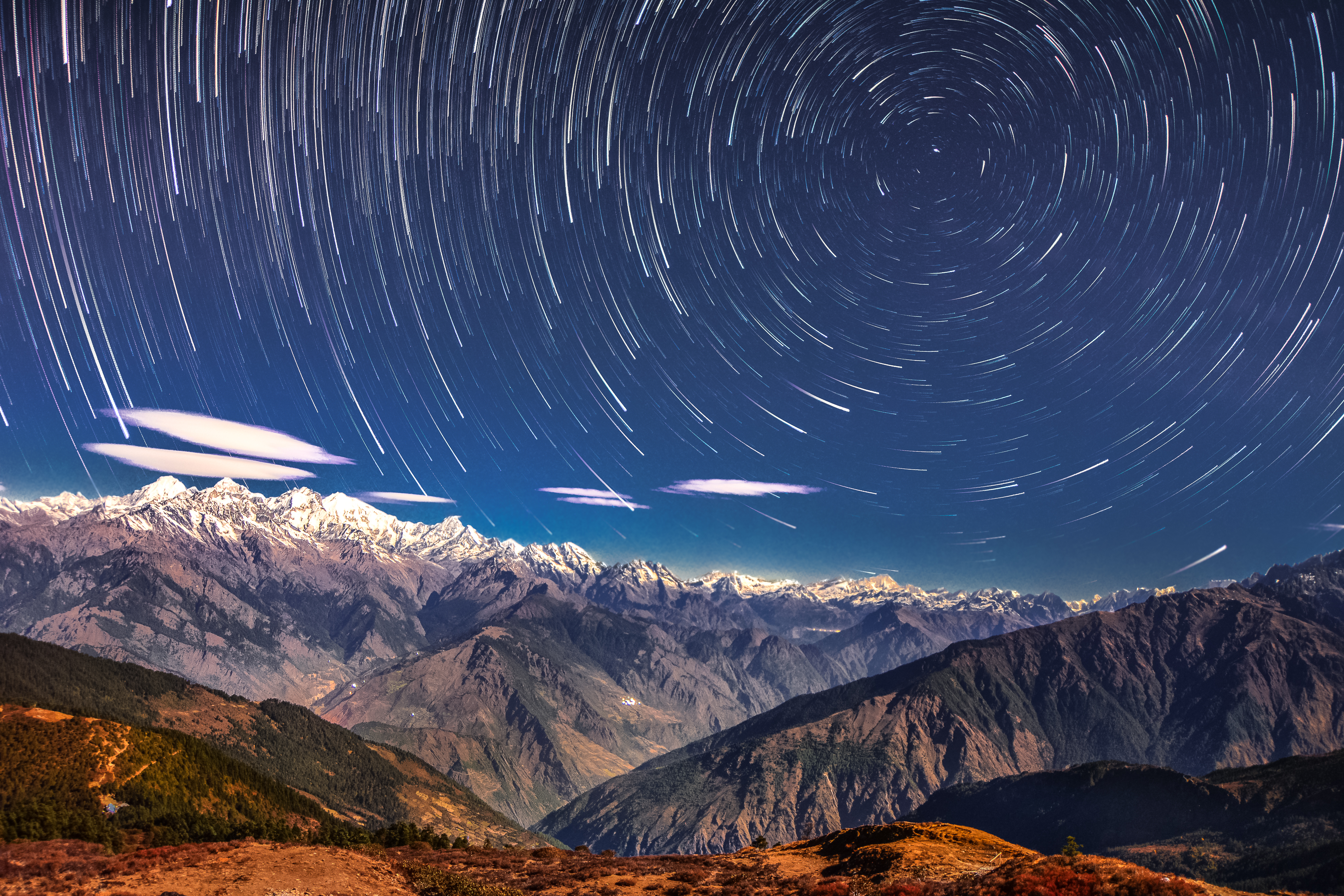 Langtang National Park - top view